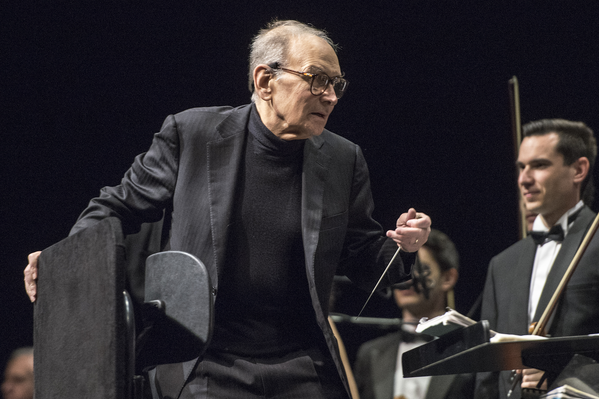 Ennio Morricone (2015) in der Festhalle Frankfurt.